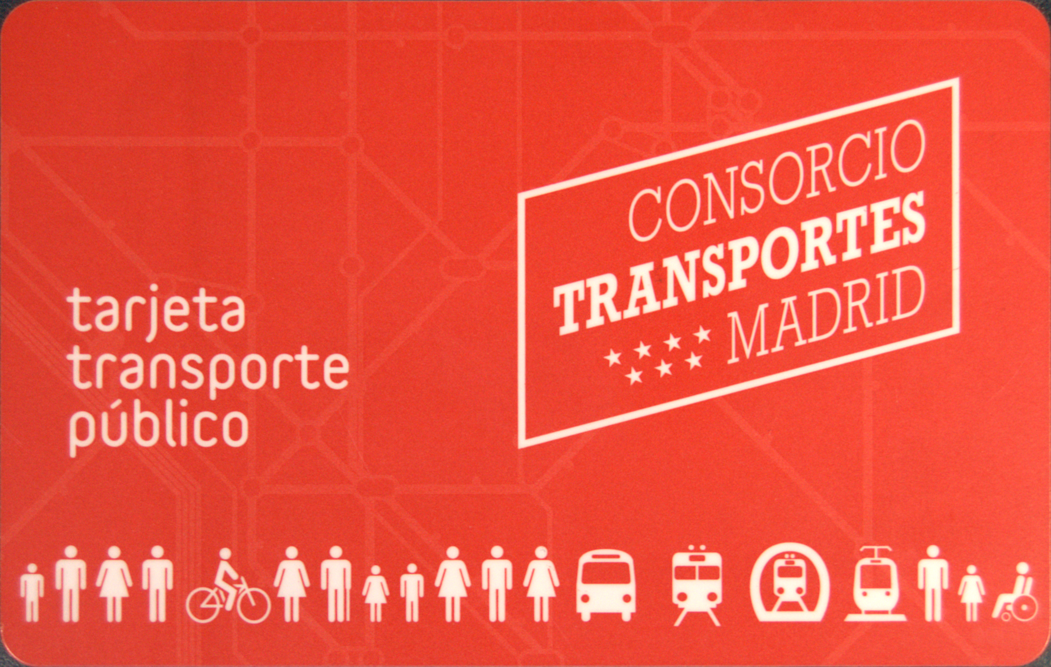 Tarjeta de transporte público de la Comunidad de Madrid (España) anverso del modelo de 2017.